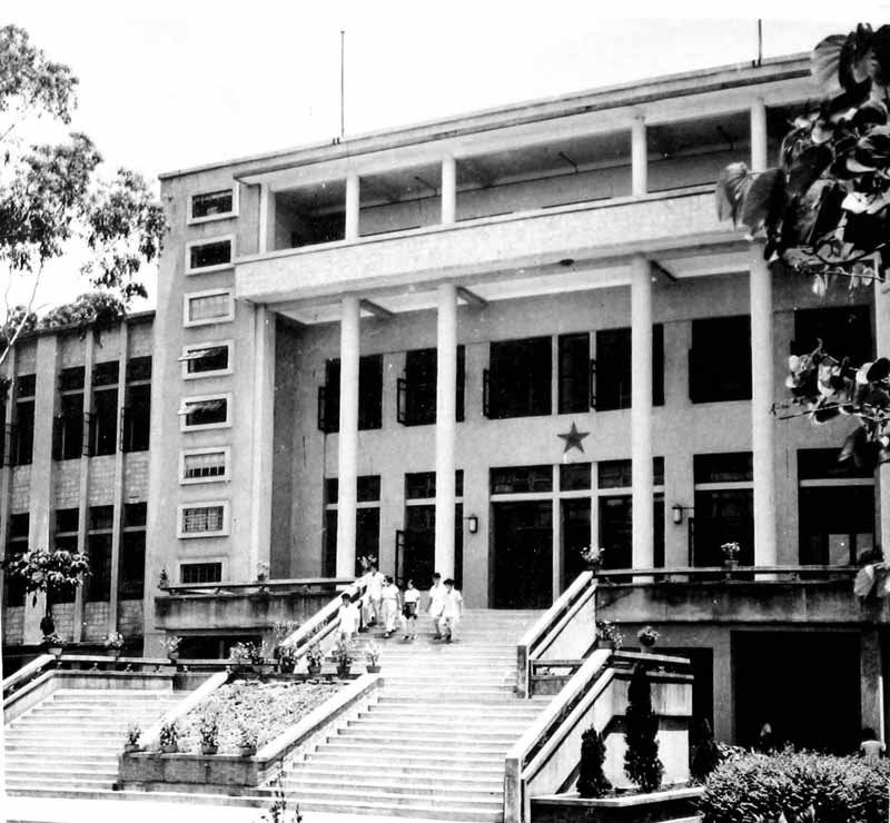 1960年（可见：[1]）的华南工学院（现华南理工大学）图书馆